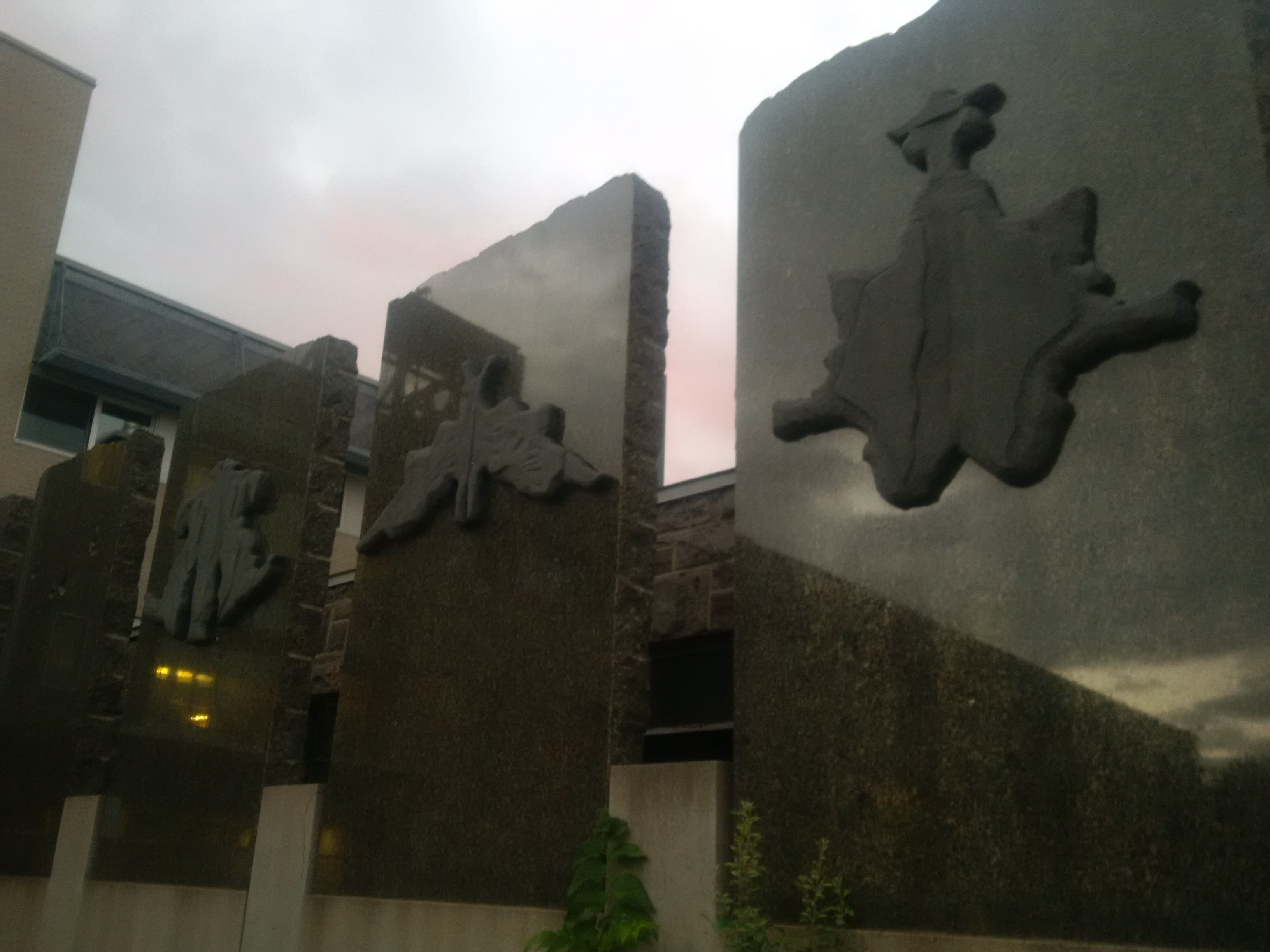 Le Miroir aux nuages. Oeuvre architecturale de Marie-France Brière (sculptrice). Cette oeuvre intègre des Taches de Rorschach. Institut Albert-Prévost, Hôpital Sacré-Cœur, Montréal, 1999.